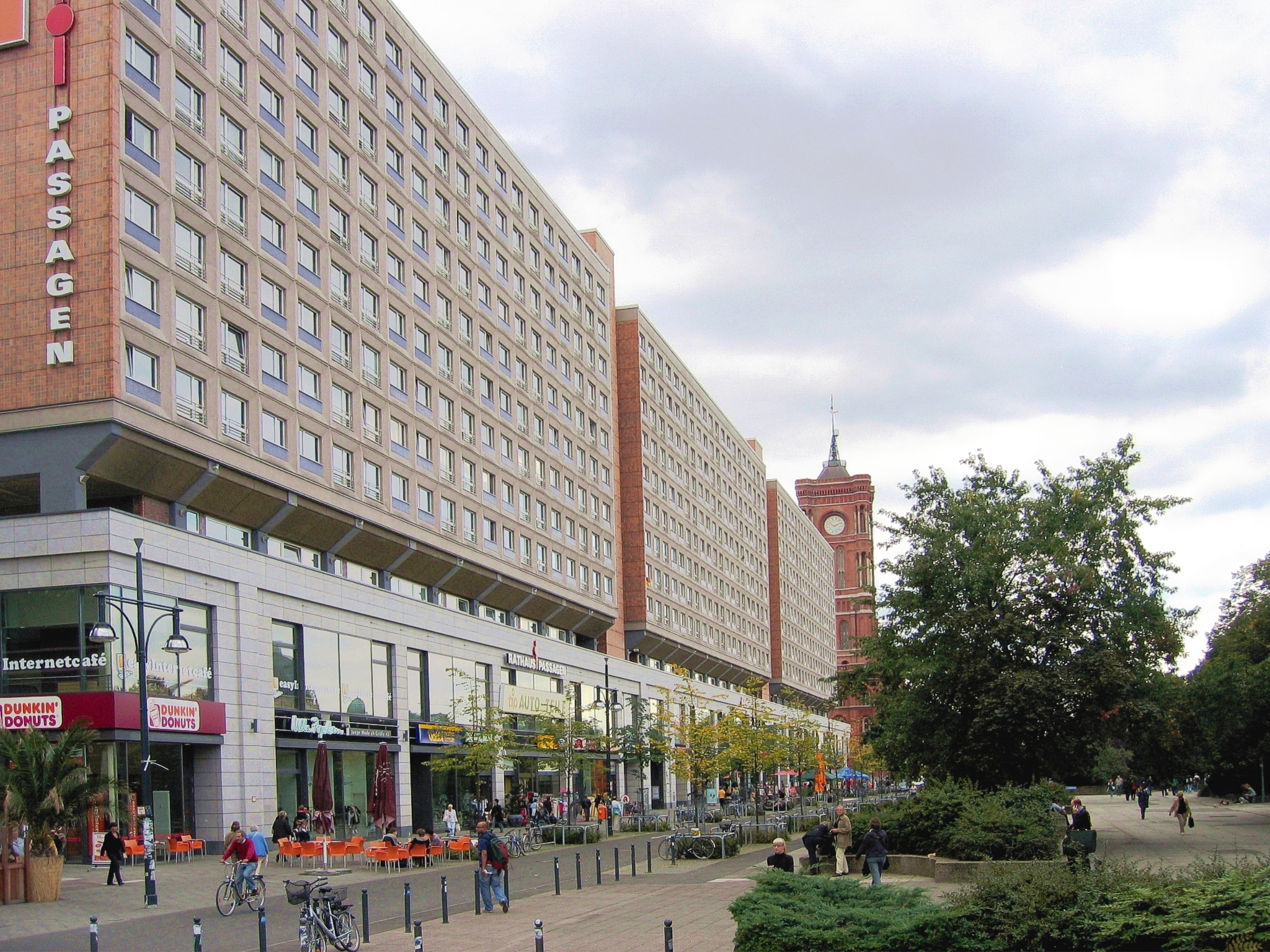 Rathausstraße (Berlin)